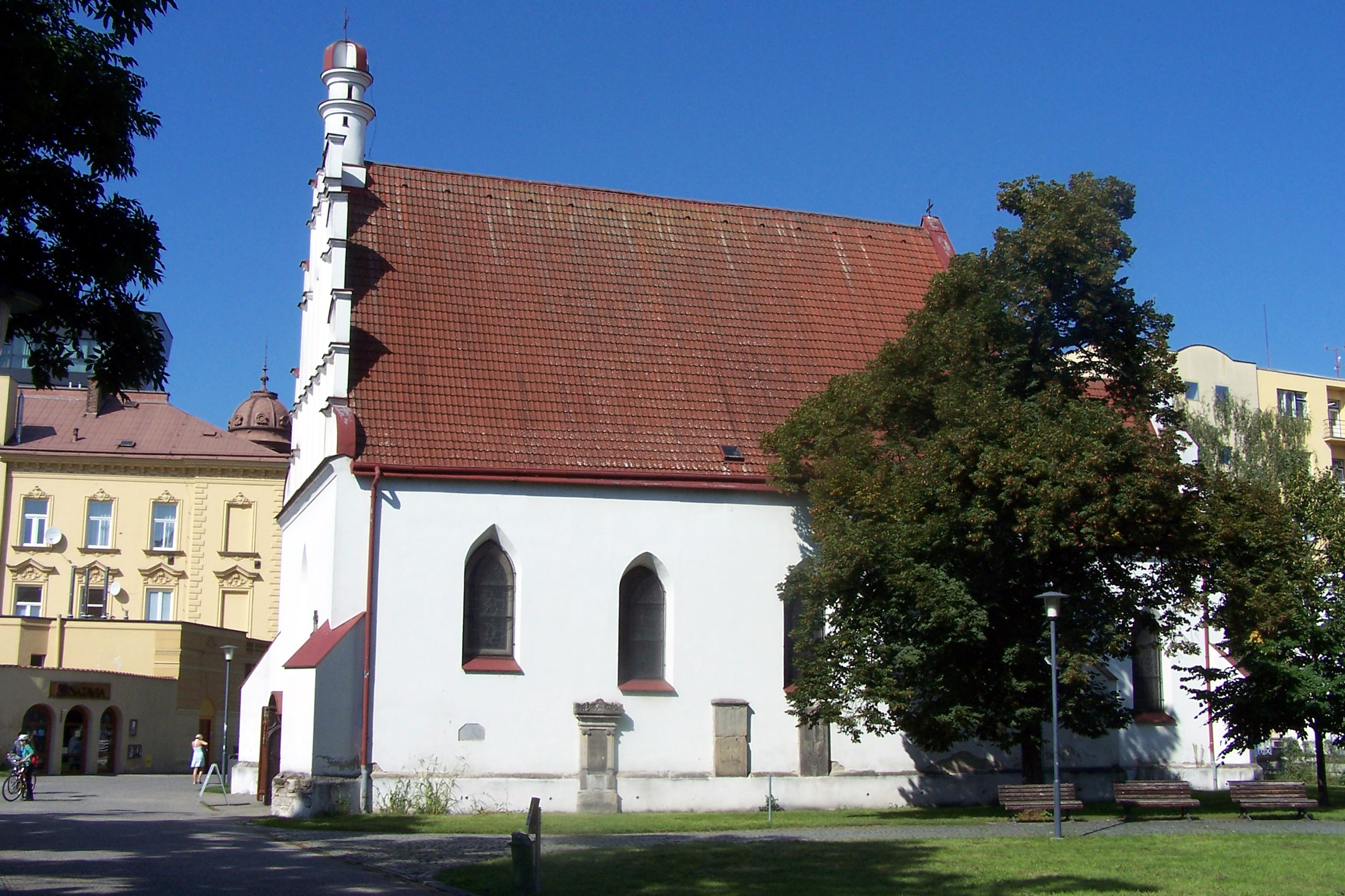 Kostel svatého Jana Křtitele (Pardubice)